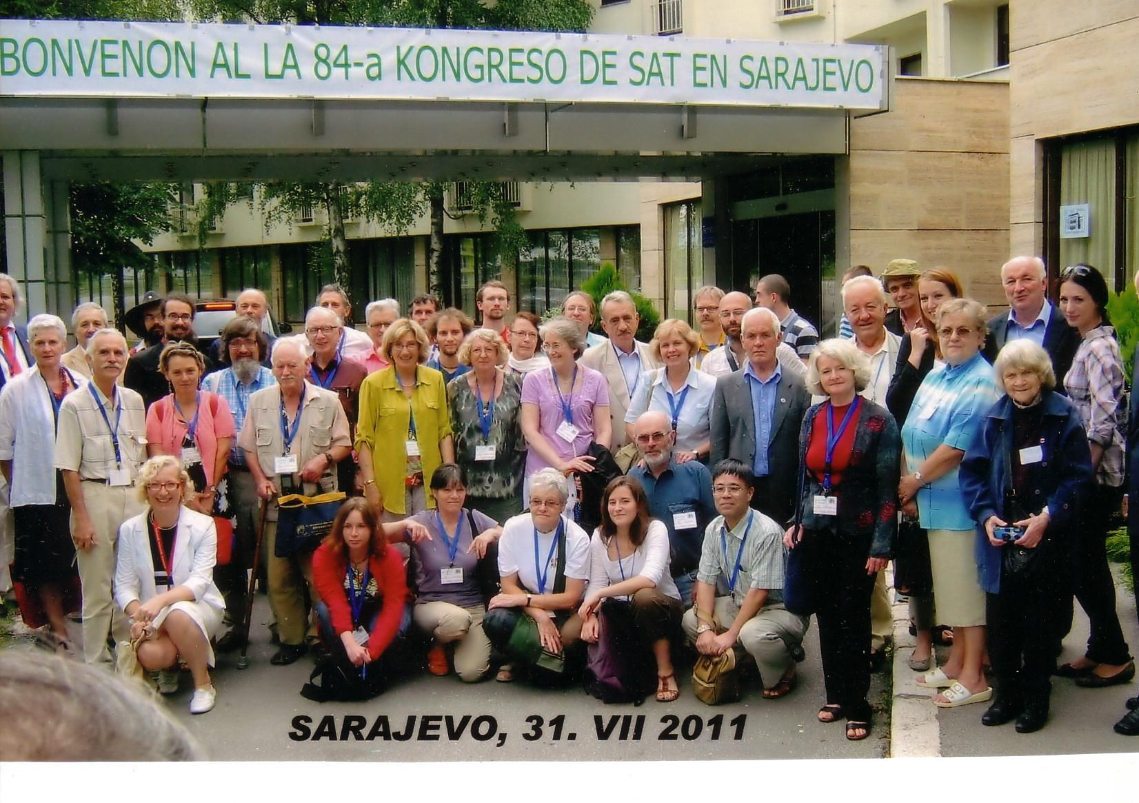 Komuna fotado en Sarajevo